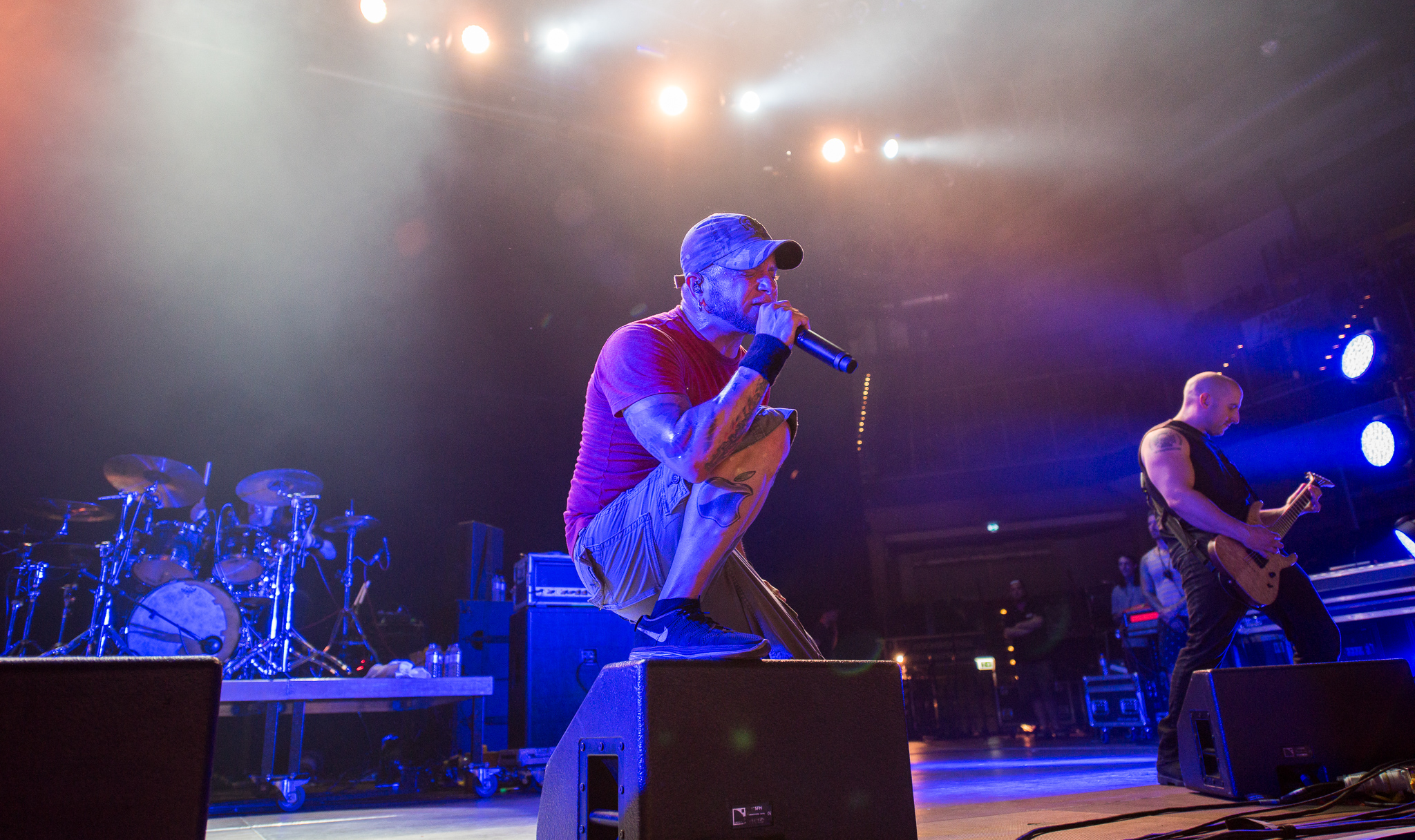 ARGO-Konzerte,All That Remains,Alternarena,Arena Nürnberger Versicherungen,Festival,Konzert,Livekonzert,Livemusik,Musik,Philip Labonte,RiP,Rock im Park 2015